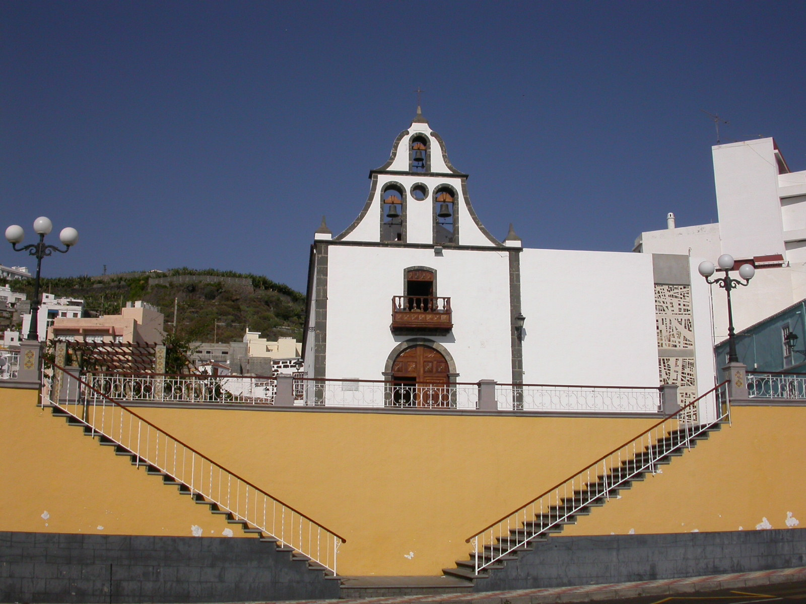 Fachada de la Iglesia de Tazacorte (La Palma)